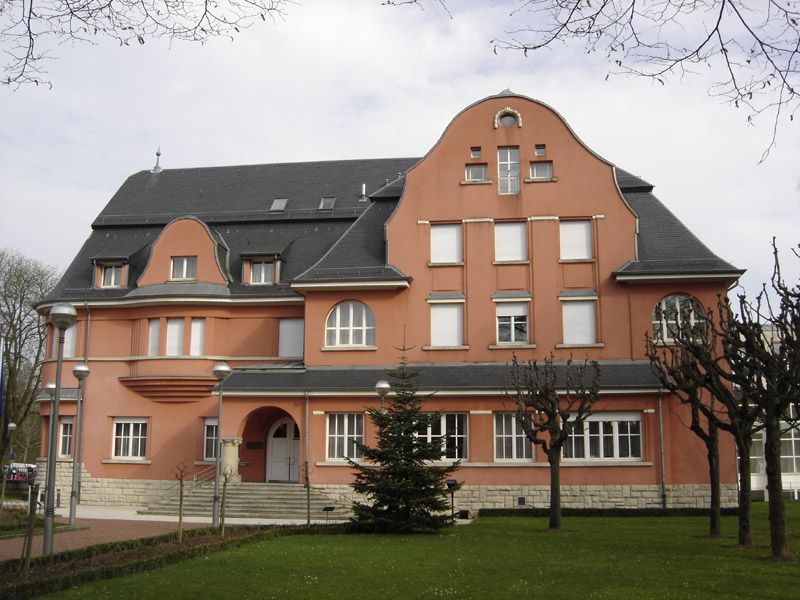 Escher Conservatoire